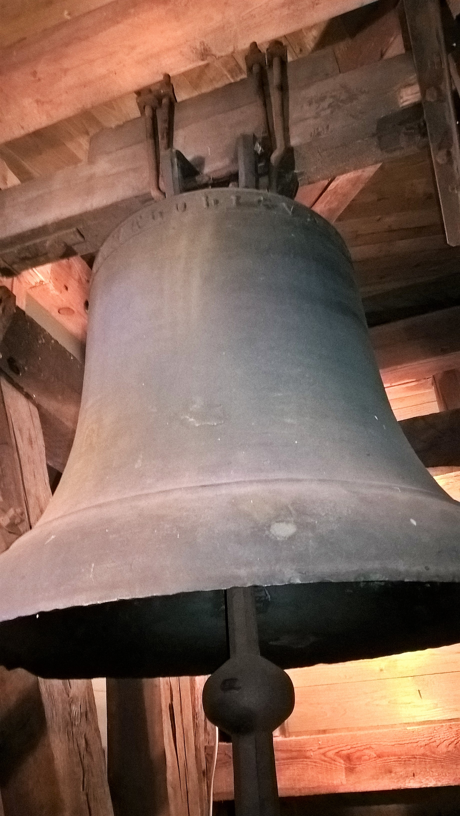 Evangelische Kirche Flensungen, Gemeinde Mücke, Vogelsbergkreis, Hessen, Deutschland